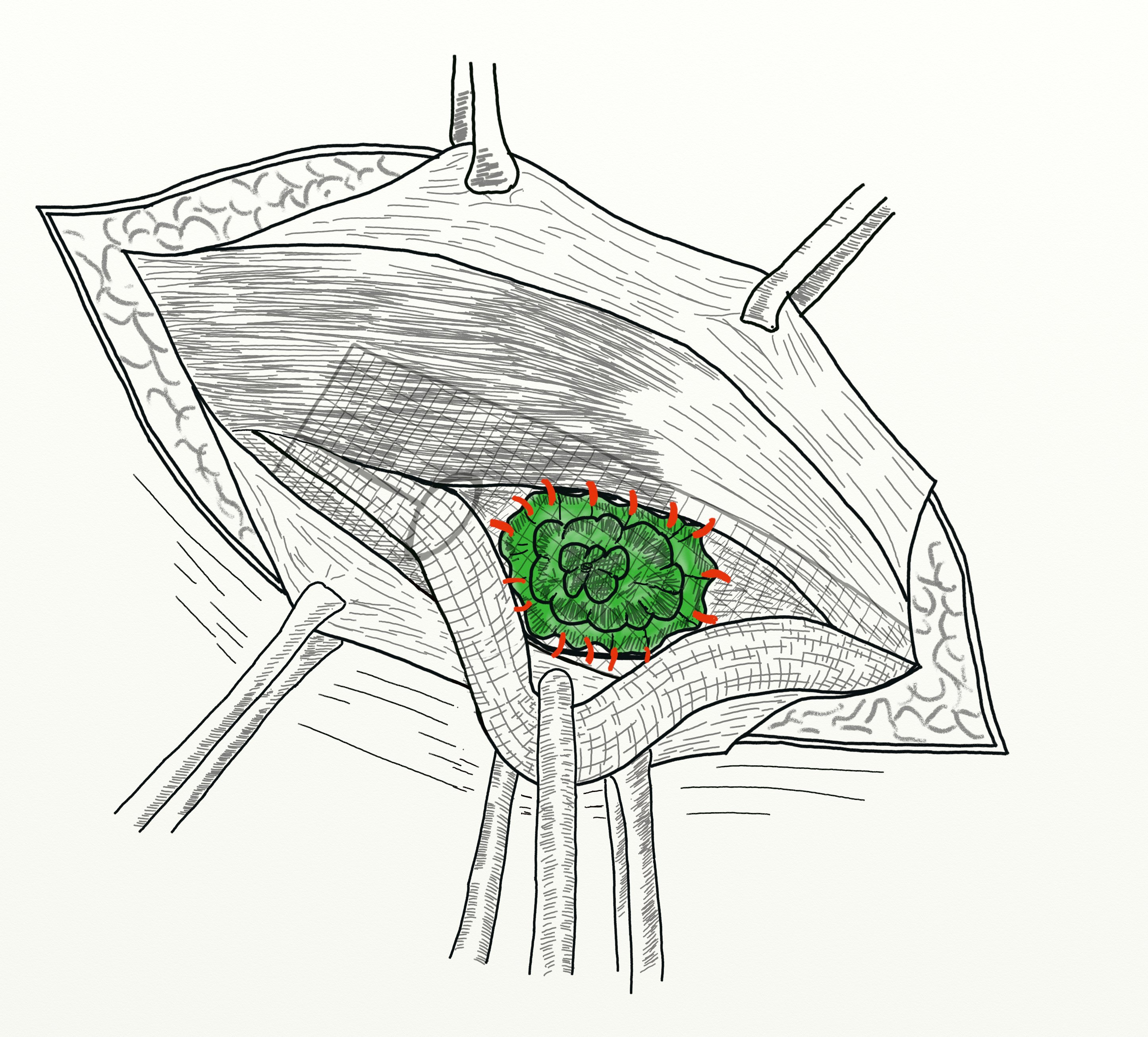 Spannungsfreie Rutkow Operation. Grünes Plug ist mit nicht resorbierbaren Nähten in der Fascienlücke eingenäht. Patch (grau) hat eine Aussparung über welche der Samenleiter nach außen geleitet wird. Patch wird nur angelegt und nicht angenäht.